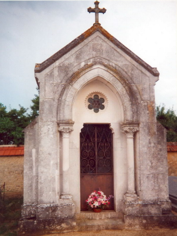 Nemeskéri Kiss Miklós 48-as honvéd ezredes, emigráns politikus családi kriptája a villecerfi (Franciaország) temetőben Fekist saját felvétele (2001)